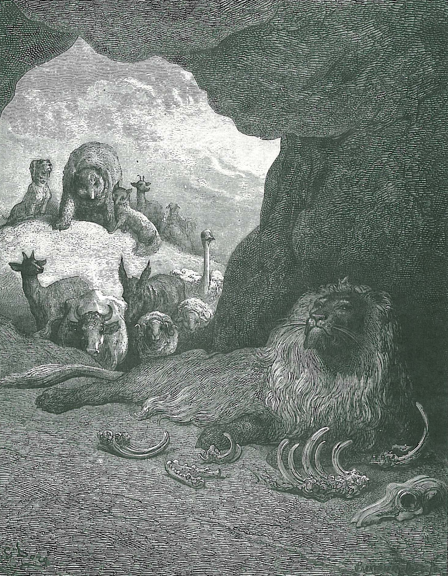 illustration for Jean de La Fontaine's fables by Gustave Doré